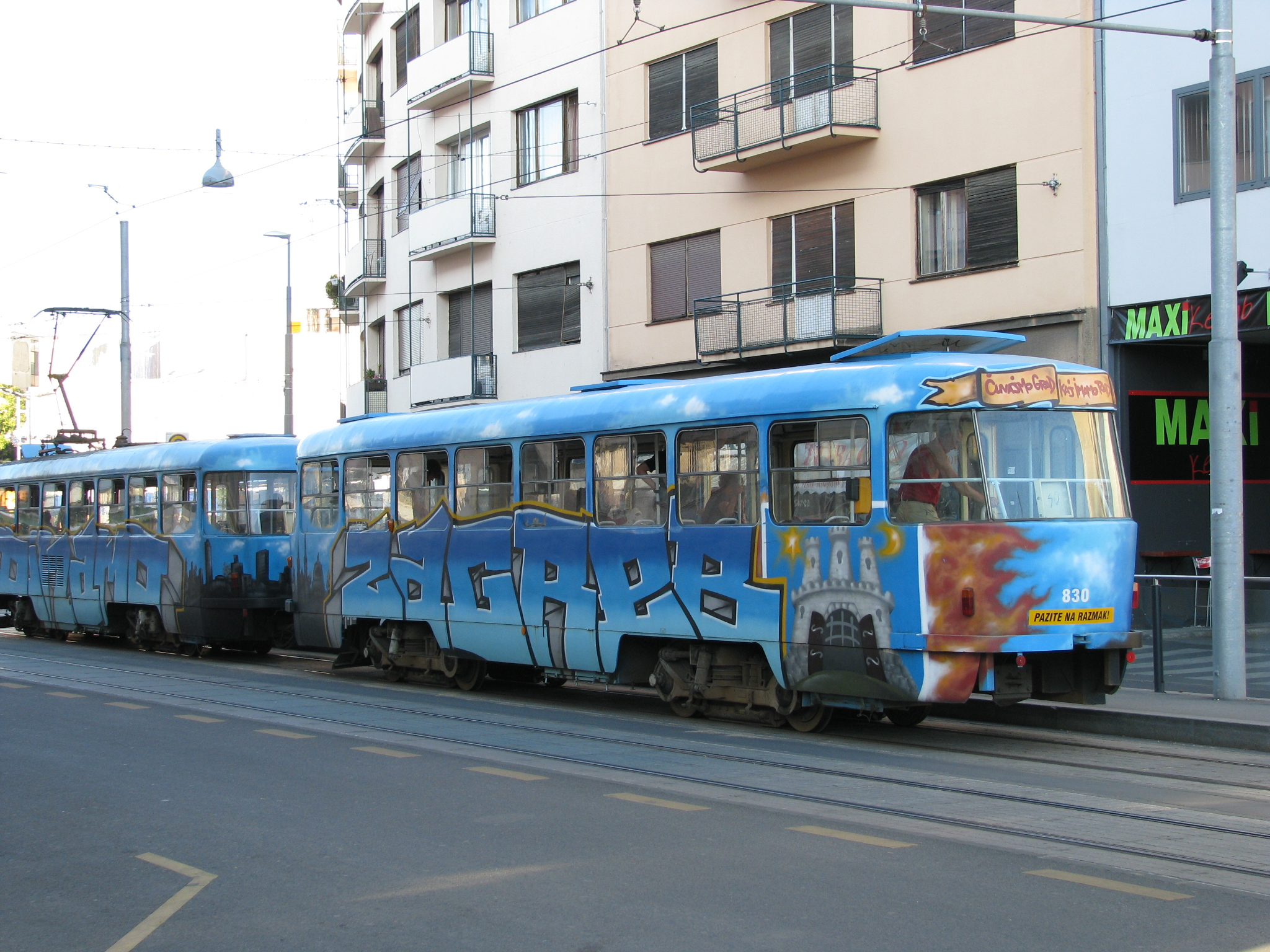 TP 830 Zagreb.JPG